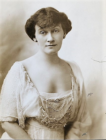 Lucile Watson